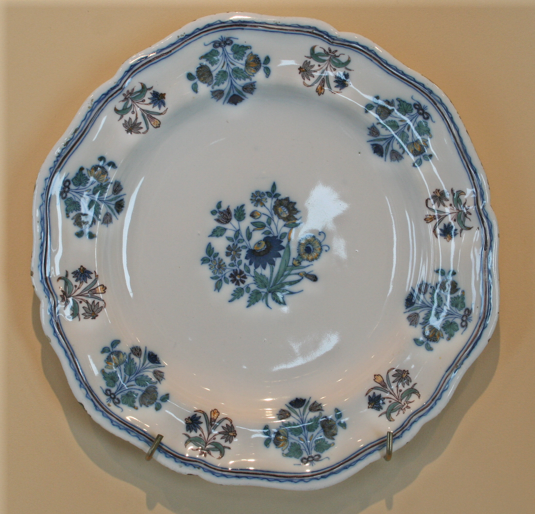 Musée de la faïence à Marseille, assiette circulaire des ateliers Clérissy à Moustiers, décor grand feu polychrome, diamètre=24cm année 1740/1745